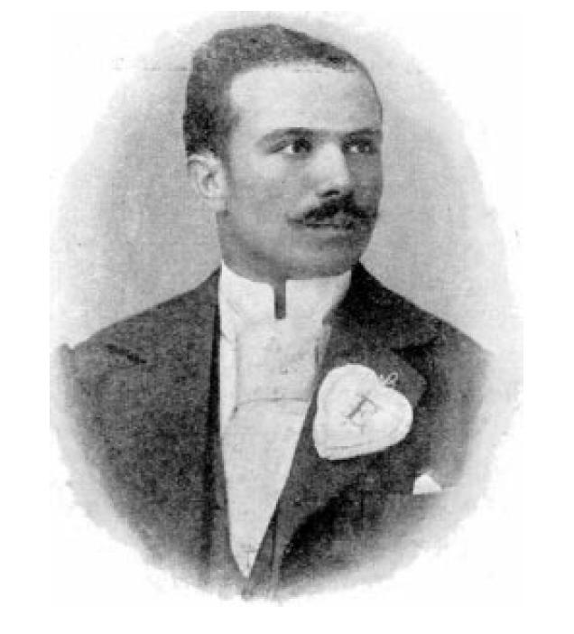 Olympiasieger 1896